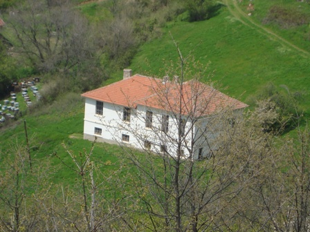 О.У_Страхиња_Симуноски,с.Куново